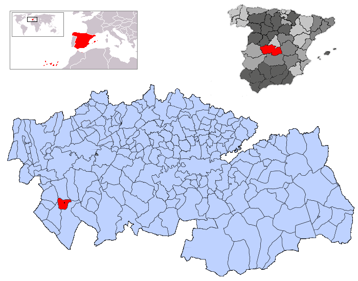 La Nava de Ricomalillo en la provincia de Toledo